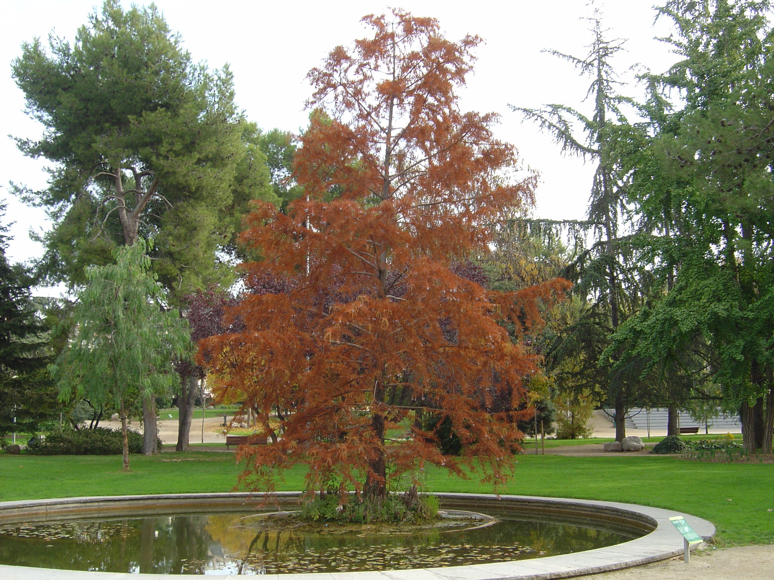 Entrada del Parc Municipal Torras i Villà. S'hi pot observar el xiprer dels pantans del llac del parc.